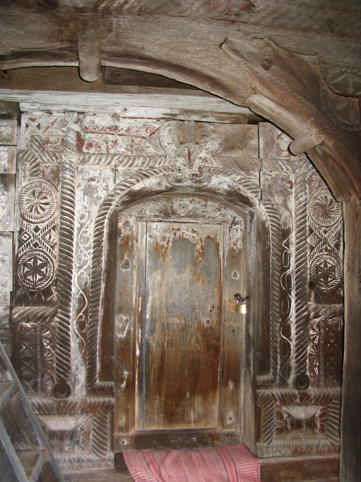 Portalul bisericii din Păuşa, judeţul Sălaj.